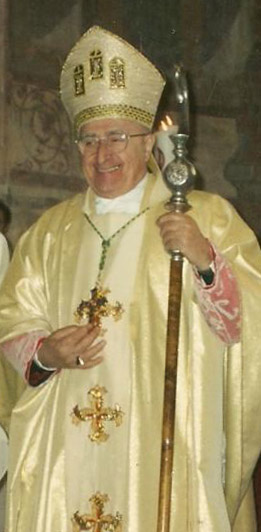 Paolo Magnani - Vescovo emerito di Treviso